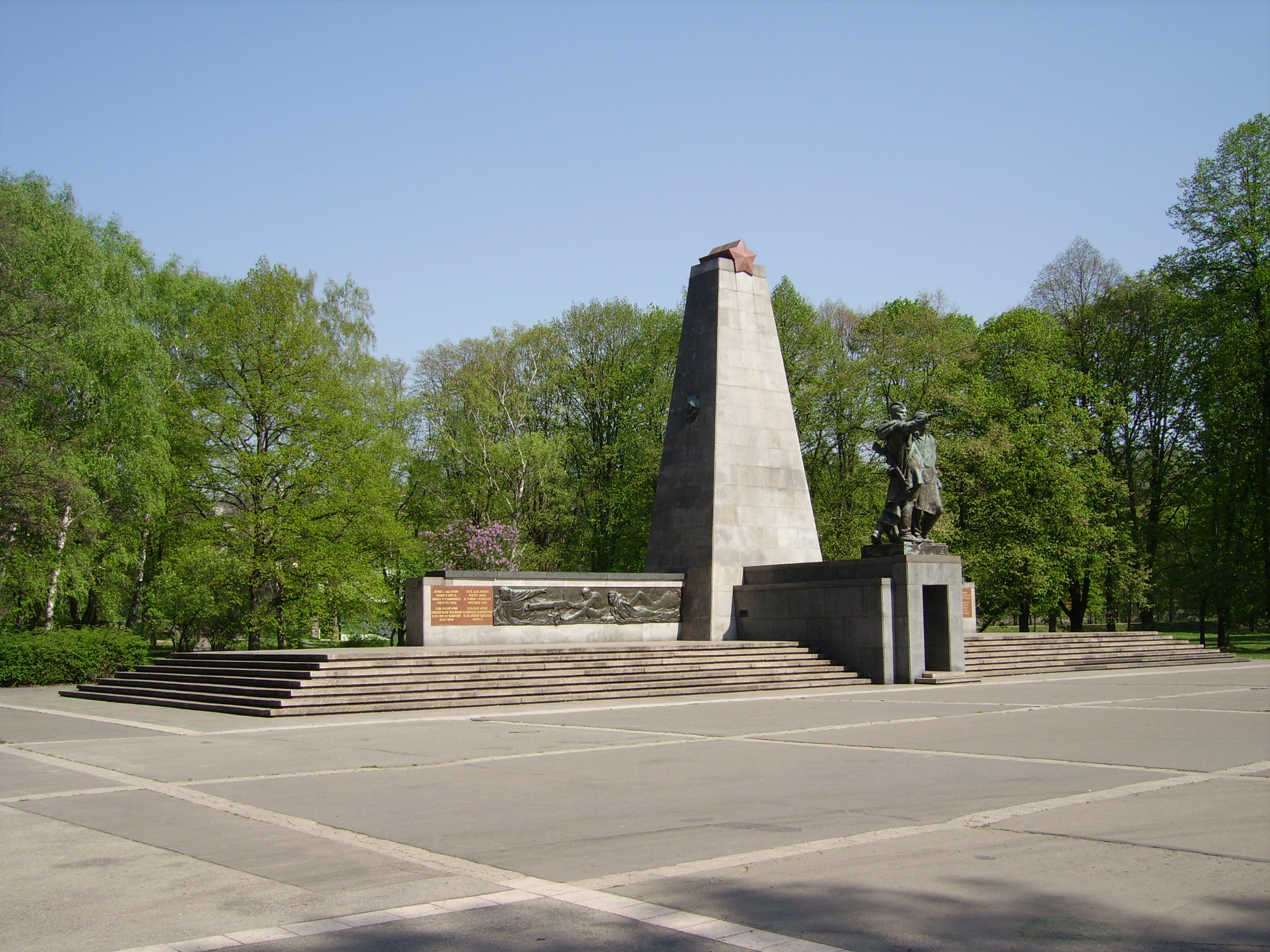 Ostrava; Památník Rudé armády v Komenského sadech